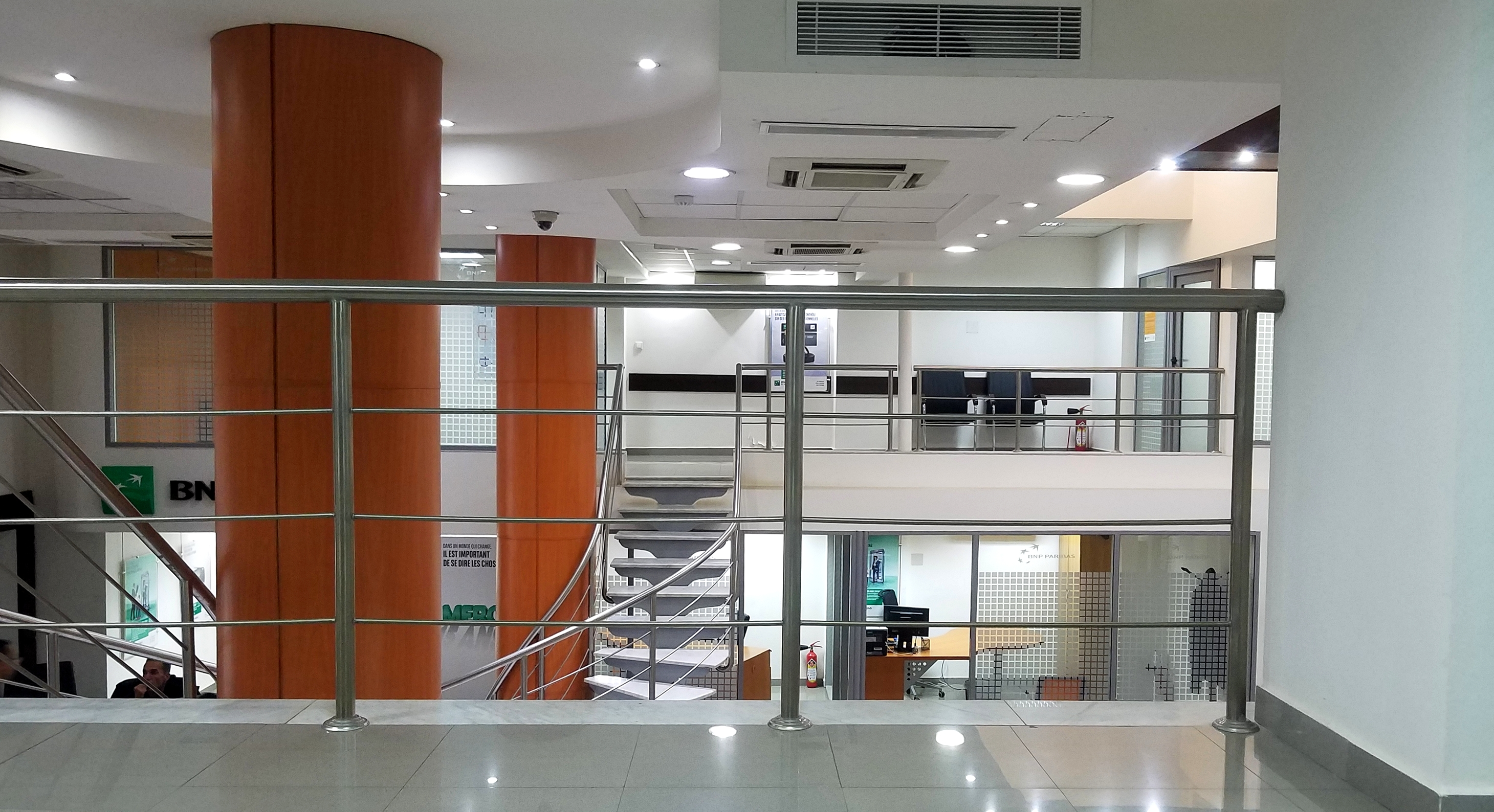 Banque BNP Paribas Eldjazaïr à Chlef